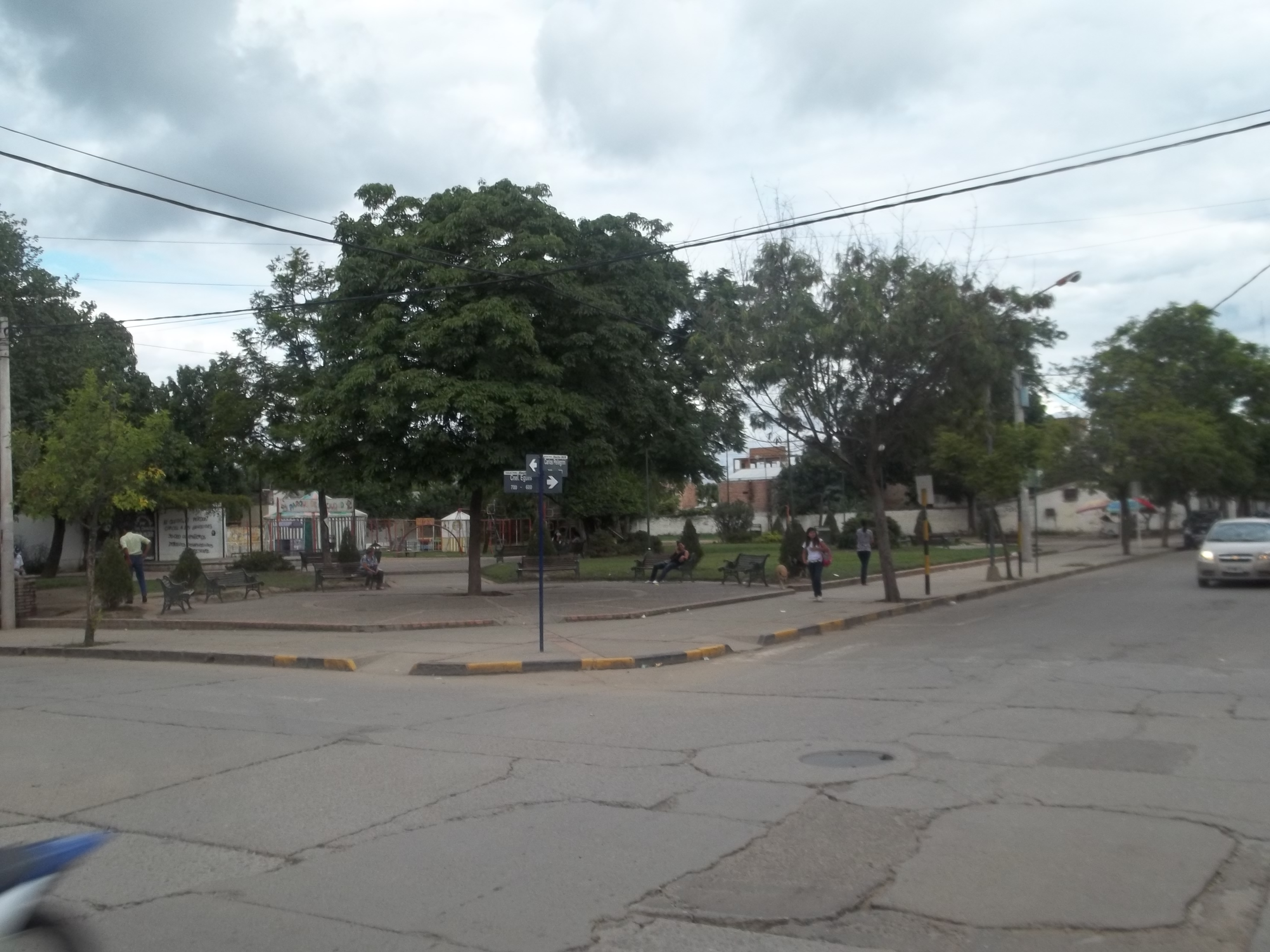 Plazoleta ubicada en la intersección de las calles Pellegrini y Egüés de la ciudad de San Ramón de la Nueva Orán, Salta.